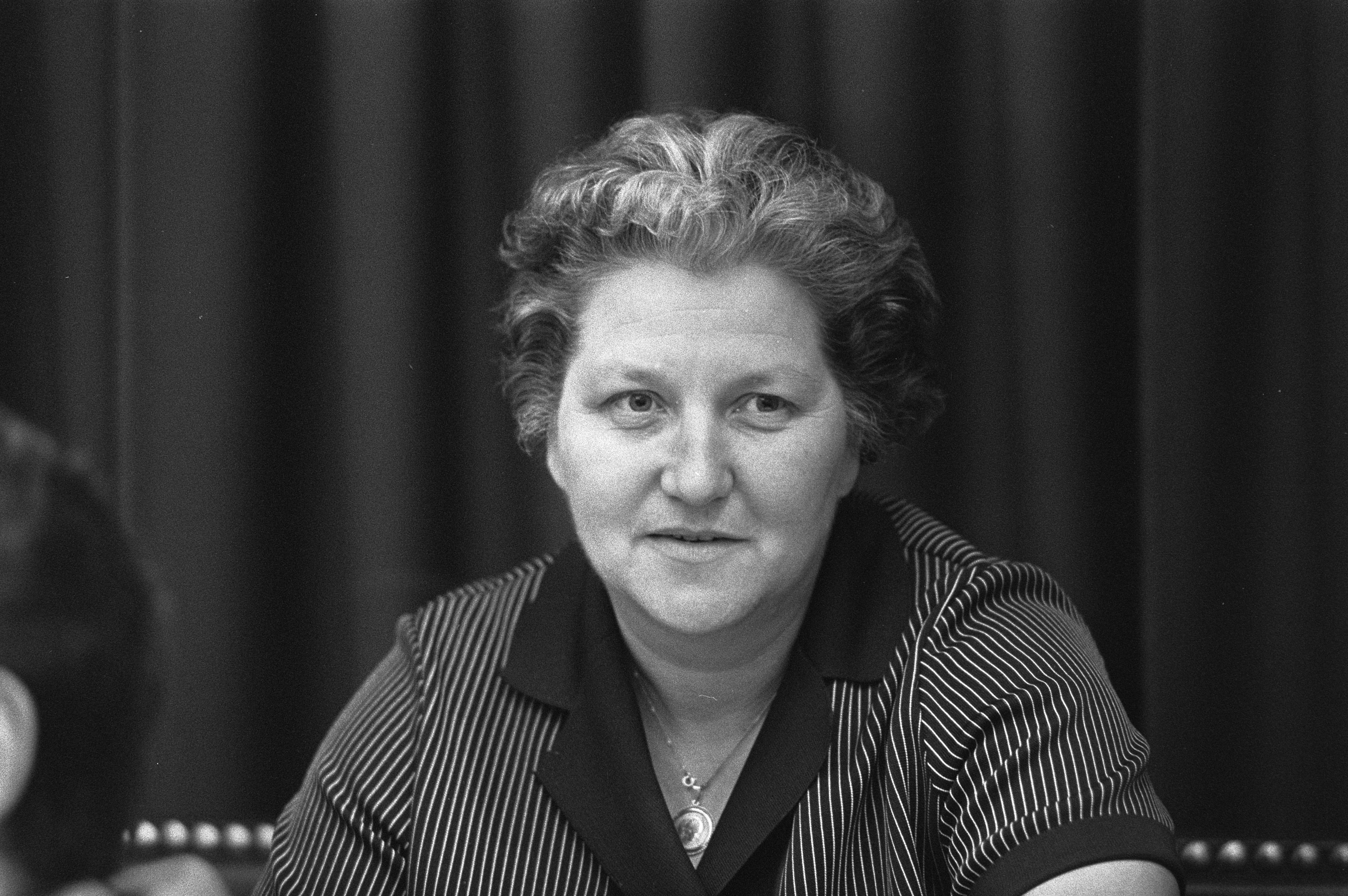 Collectie / Archief : Fotocollectie Anefo Reportage / Serie : Debat in Tweede Kamer over moeilijkheden bij de Landmacht Beschrijving : ARP-vicefractievoorzitter Hannie van Leeuwen (ARP) Annotatie : randnegatiefstrooknummers 11, 12: Mej. L. van Leeuwen (ARP) Datum : 22 juni 1972 Locatie : Den Haag, Zuid-Holland Trefwoorden : parlementaire debatten, parlementariërs, politici, politieke partijen, portretten Persoonsnaam : Leeuwen, Hannie van Instellingsnaam : ARP, Koninklijke Landmacht Fotograaf : Fotograaf Onbekend / Anefo Auteursrechthebbende : Nationaal Archief Materiaalsoort : Negatief (zwart/wit) Nummer archiefinventaris : bekijk toegang 2.24.01.05 Bestanddeelnummer : 925-6858